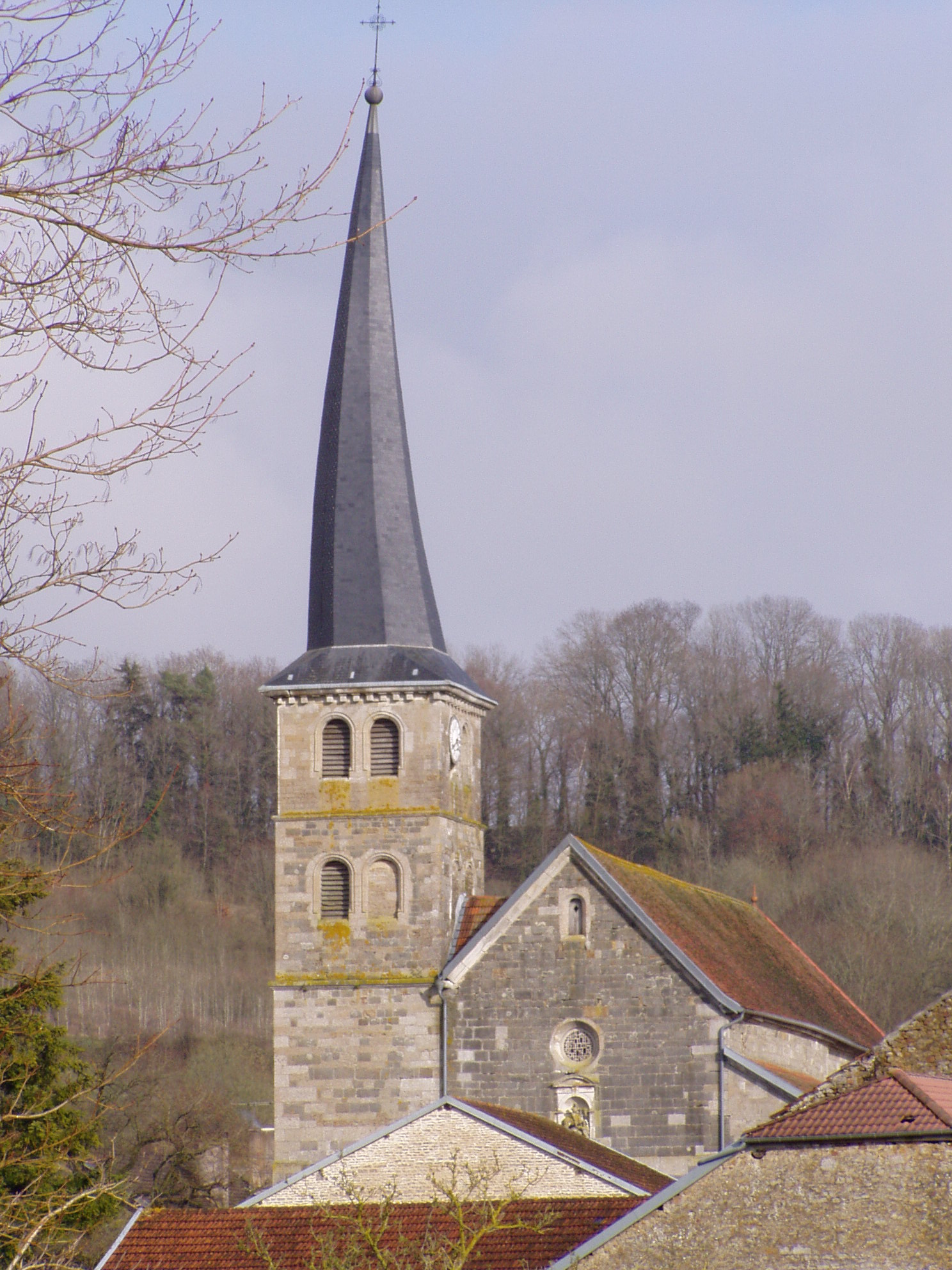 photographie du clocher tors de l'église de Meuvy commune de Breuvannes-en-Bassigny (Haute-Marne) (France)